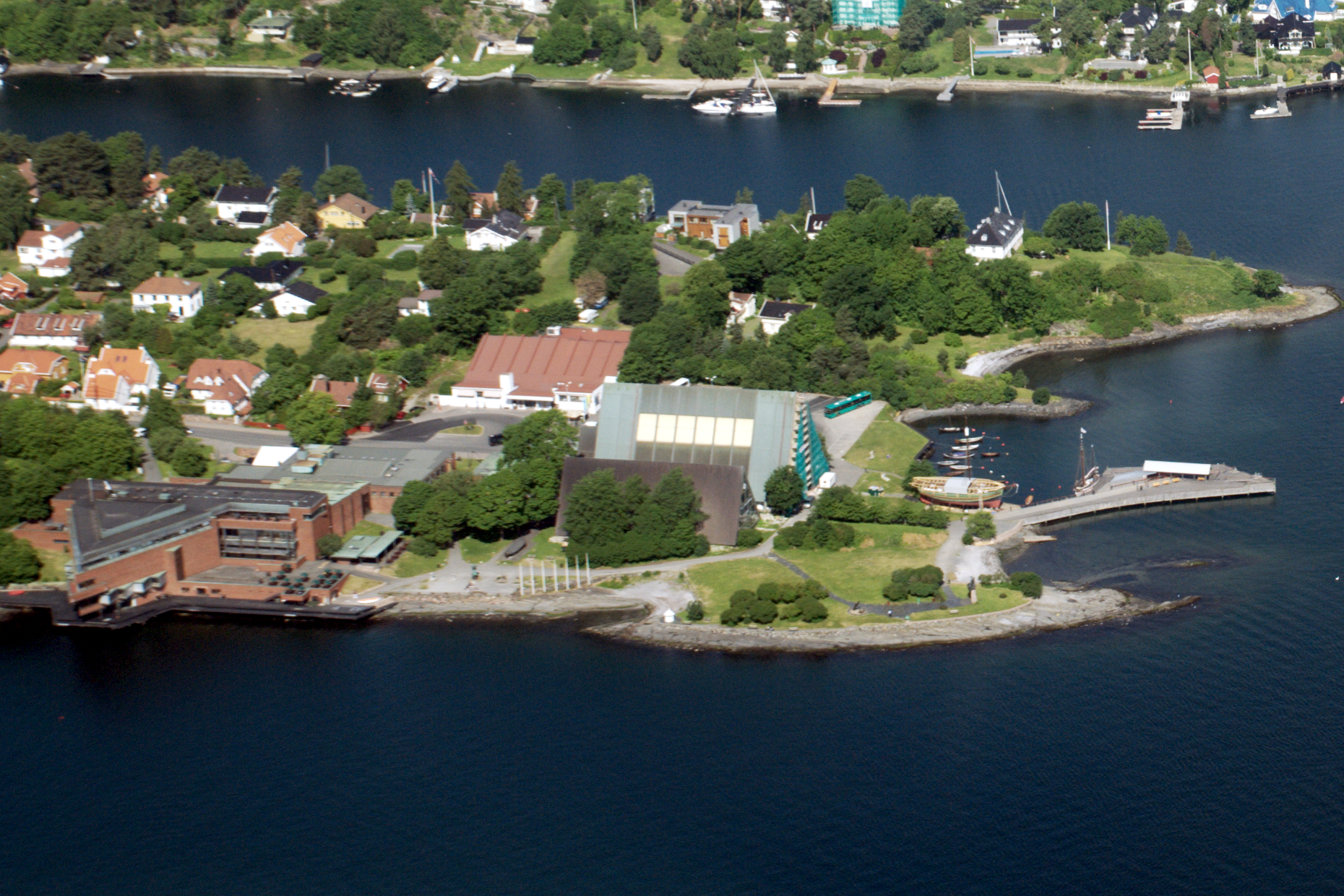 Bygdøy